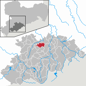 Gelenau/Erzgeb. im Erzgebirgskreis, Sachsen